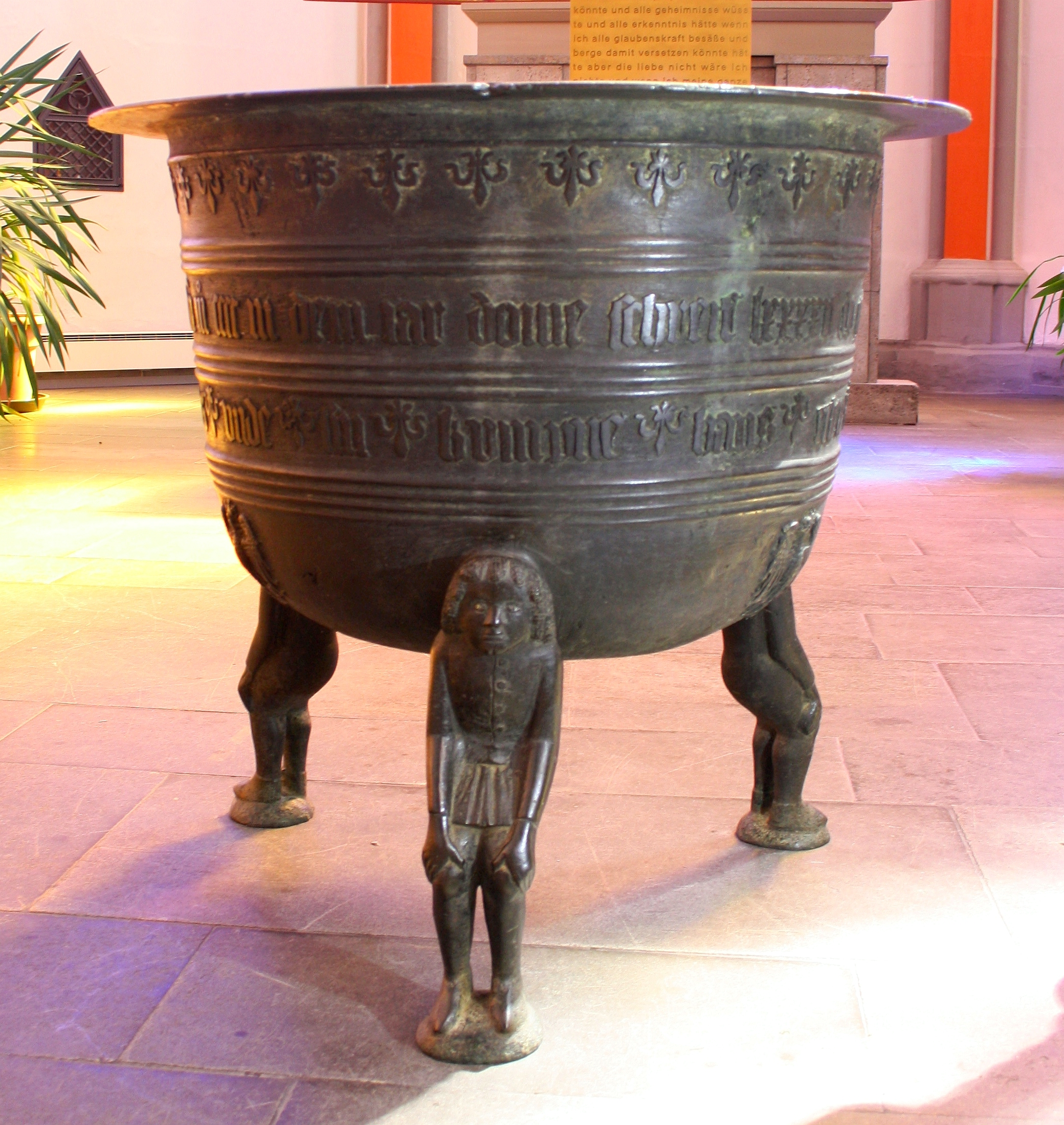 Bronzetaufe (1492) in St. Marien, Heiligenstadt